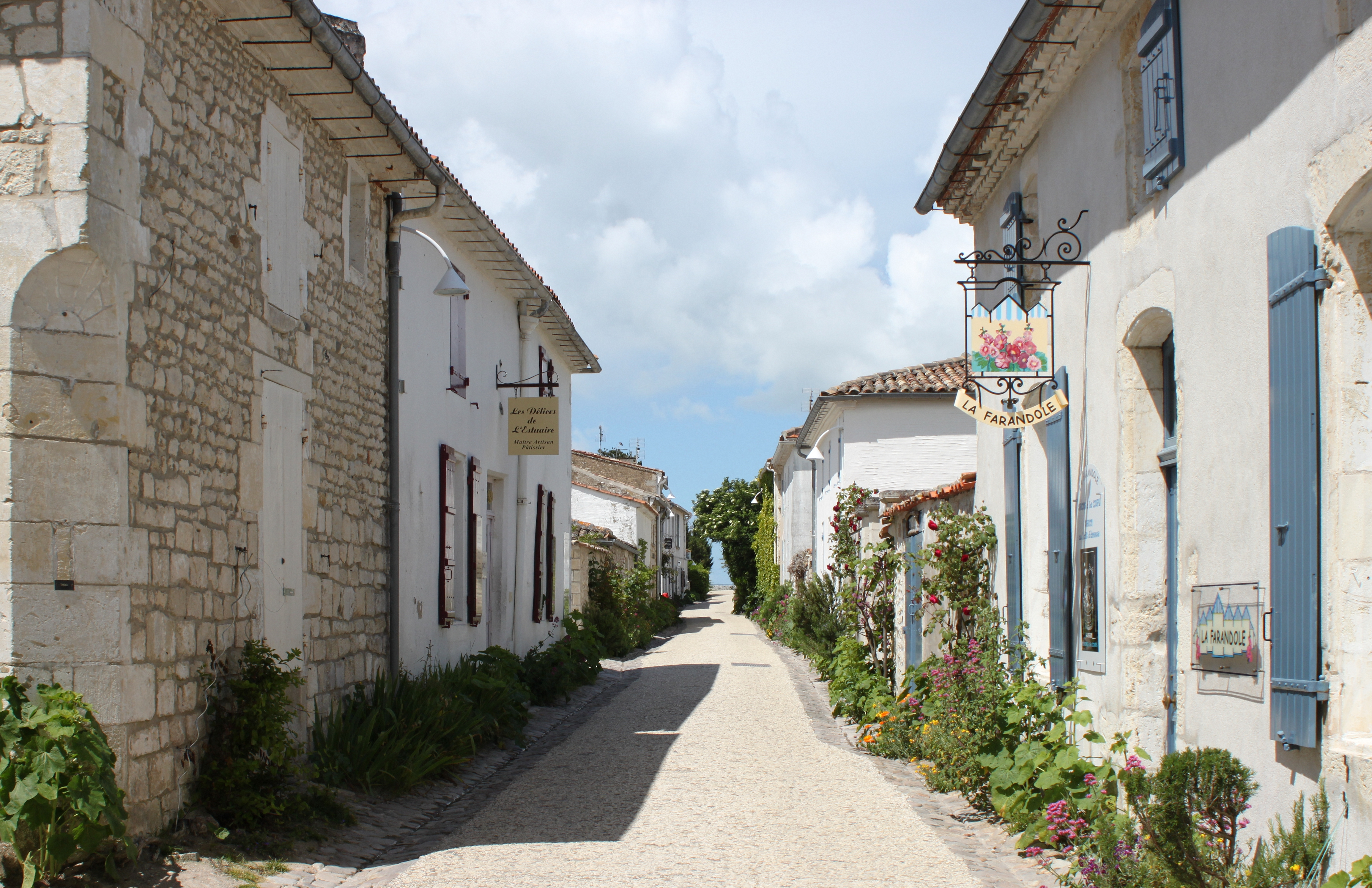 Rue du Port, Fr-17-Talmont-sur-Gironde.